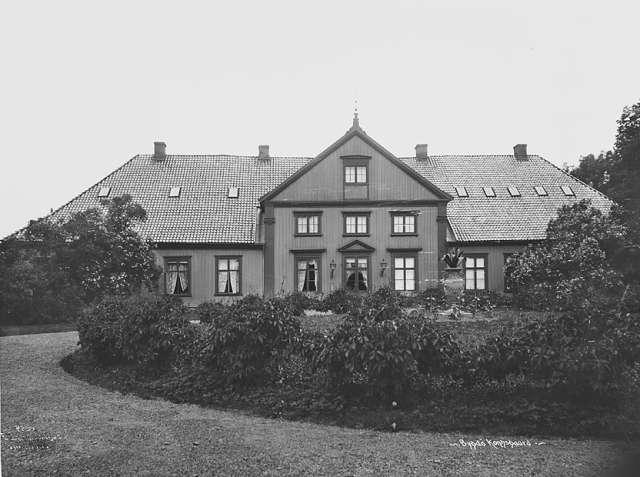 Bygdøy Royal Estate in Oslo.